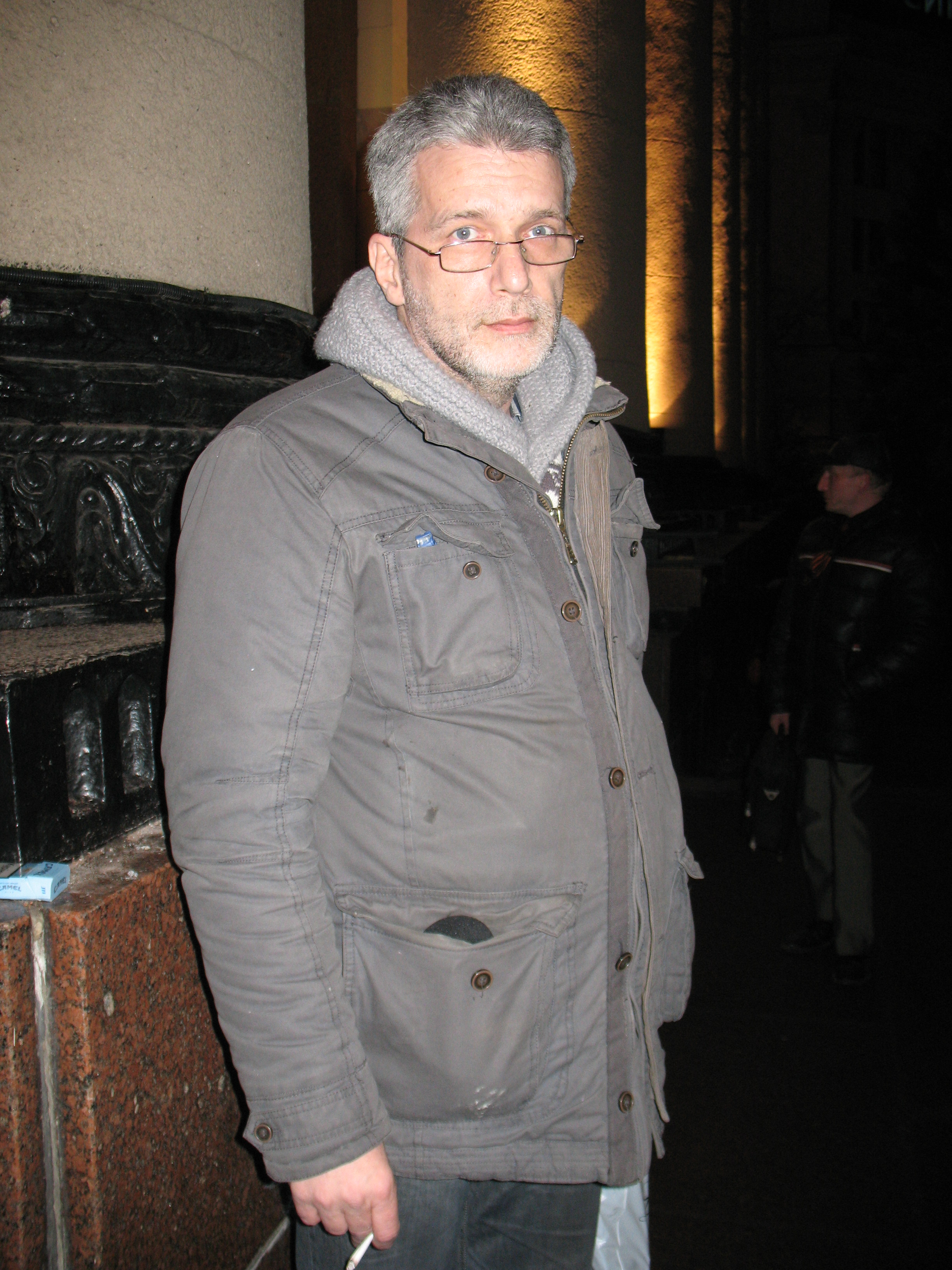 Ведущий телепередачи "Свободы слова" (АйСиТиВи) Андрей Куликов в Харькове сразу после освобождения обладминистрации от боевиков "Правого сектора". Центральный вход в здание с Сумской, слева постамент "сталинской" колонны. Фото сделано с личного разрешения А. Куликова.